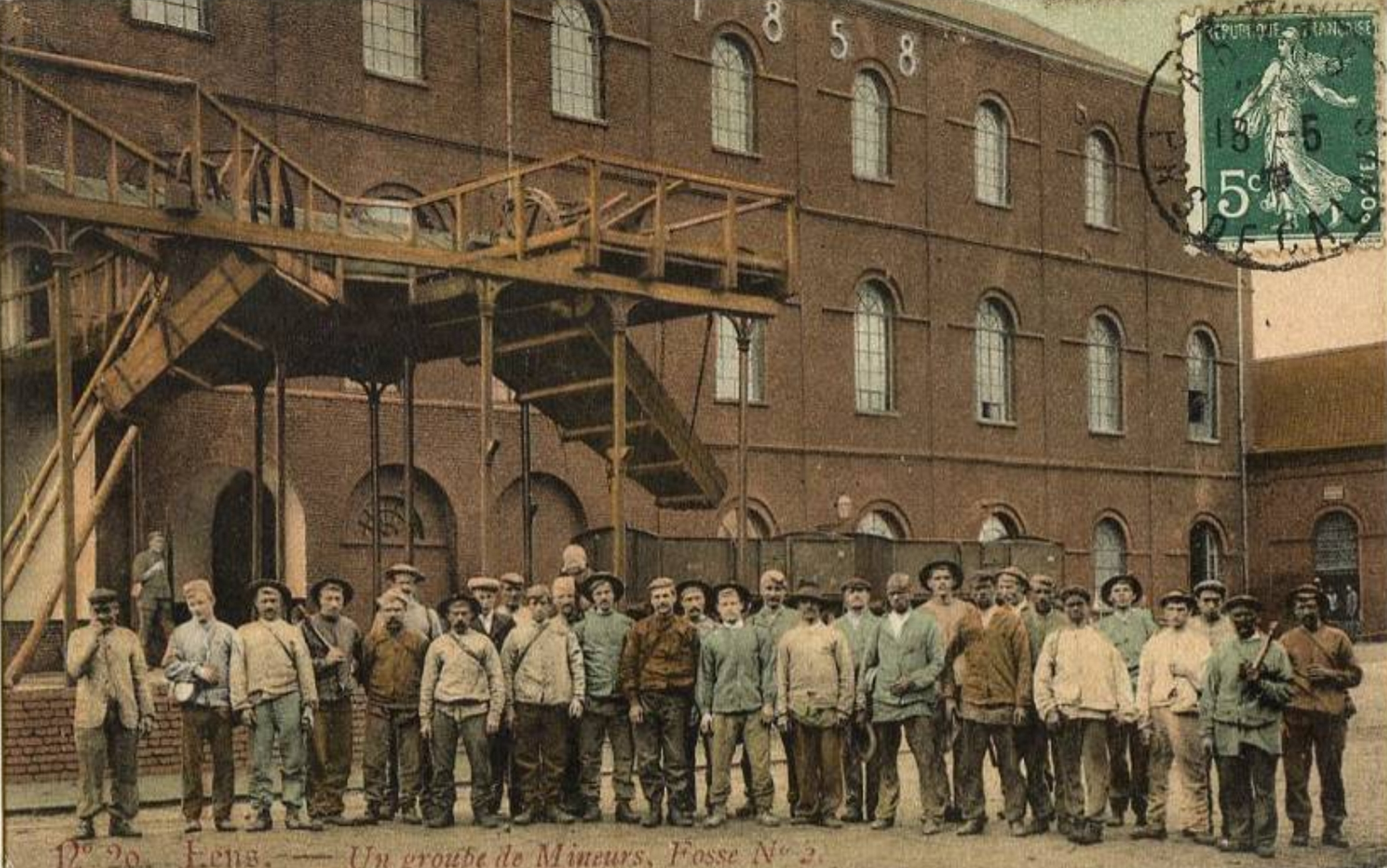 La fosse n° 2 - 2 bis de la Compagnie des mines de Lens était un charbonnage constitué de deux puits situé à Lens, Pas-de-Calais, Nord-Pas-de-Calais, France.